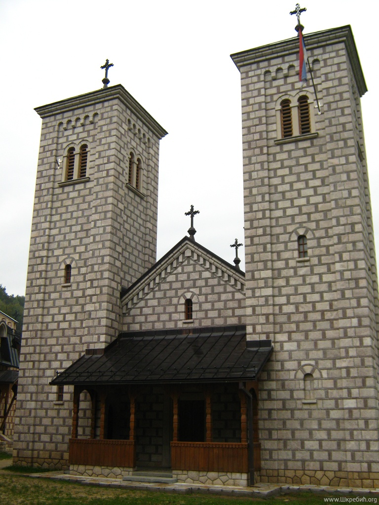 Манастир Ступље с лица. Властита фотографија.